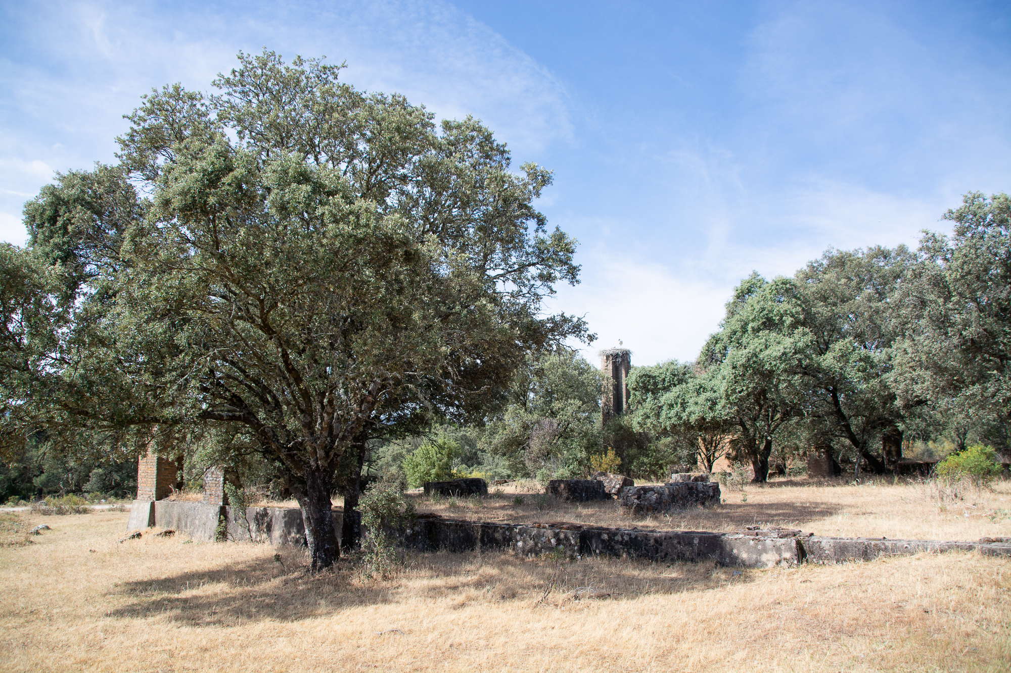 Ruinas de lo que fueron los hangares del aeródromo durante la Guerra Civil